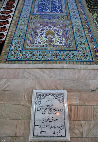 مزار حسنعلی خودکی